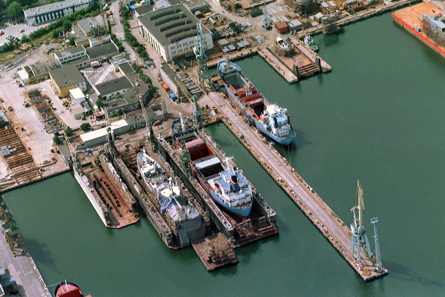 Gdynia. Basen portowy.